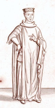 Pierre II de Bretagne